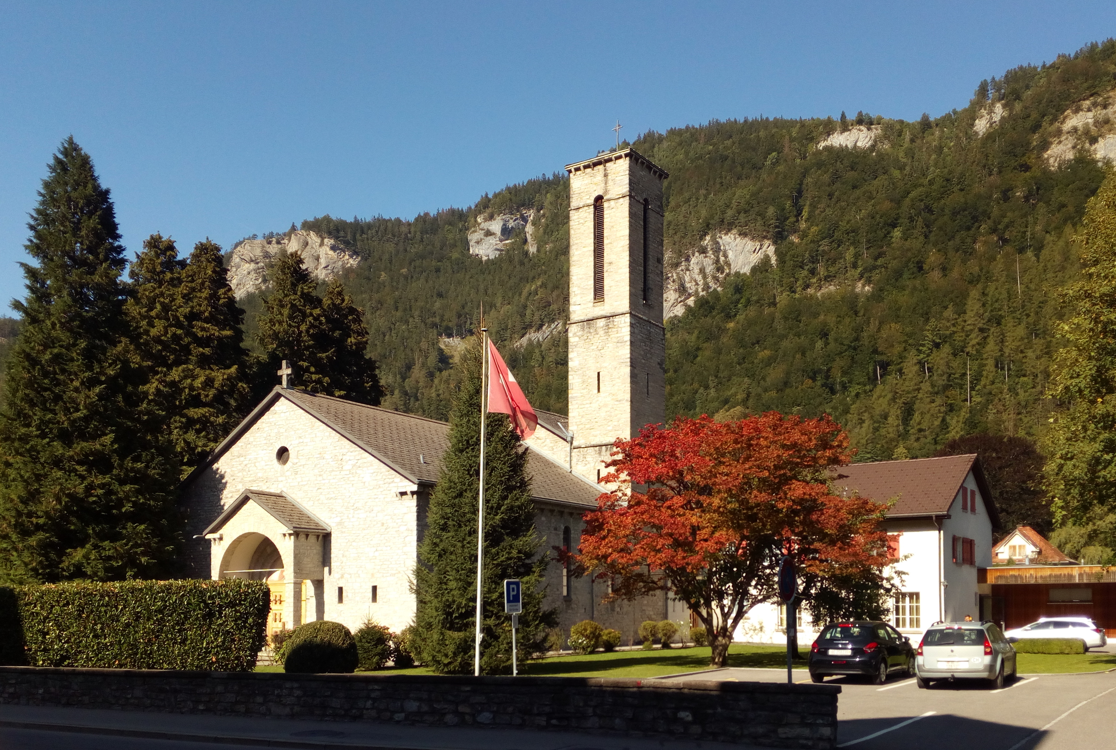 Römisch-katholische Guthirt-Kirche von Meiringen im Berner Oberland